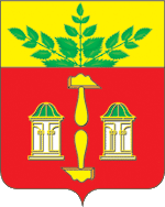 Герб Щёкинского района Тульской области